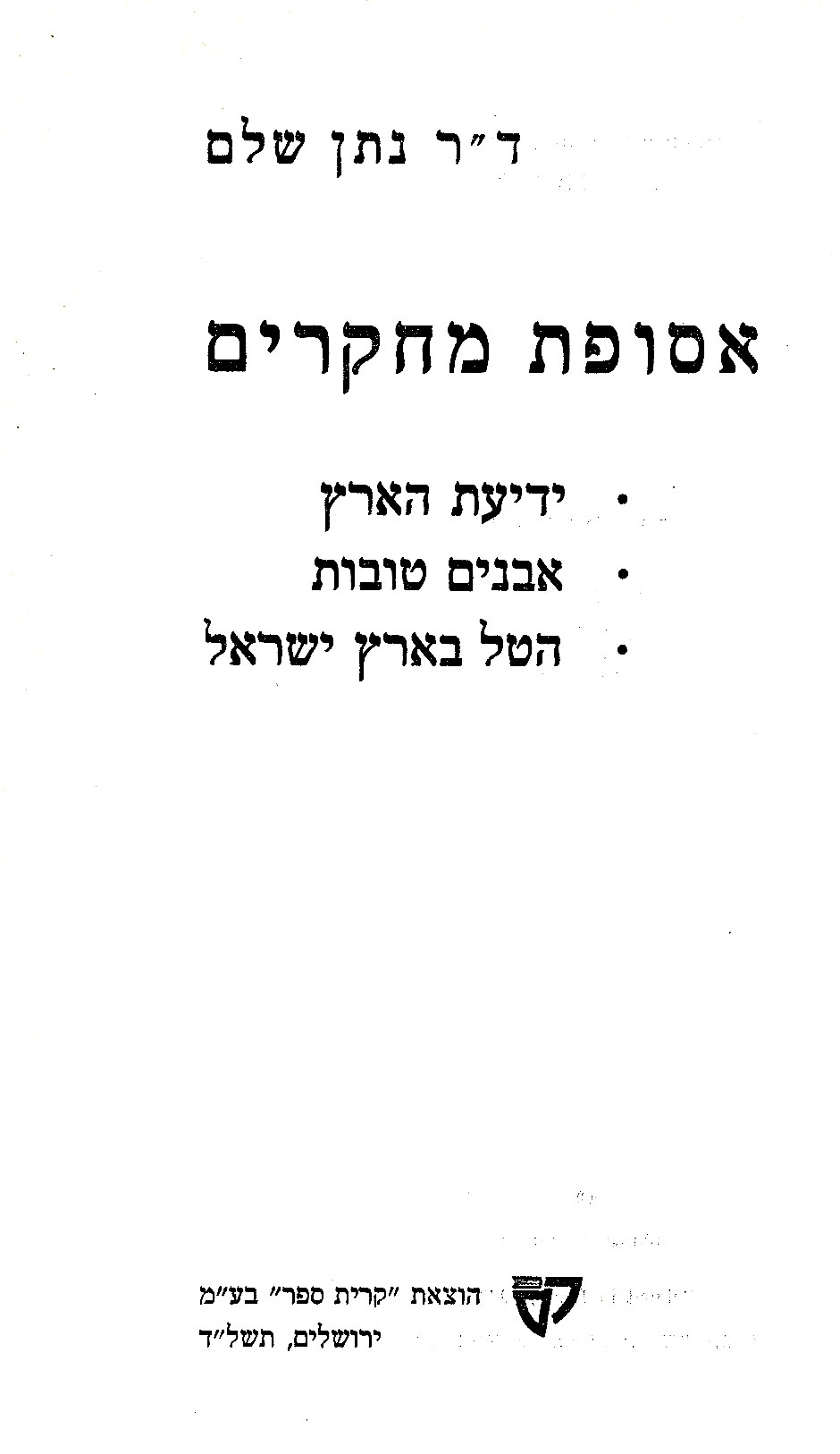 אוסף המאמרים של נתן שלם שהוצא אחרי מותו על ידי חבריו ומכיריו מסלוניקי. באוסף כלולים מאמרים ומונגרפיות שכתב